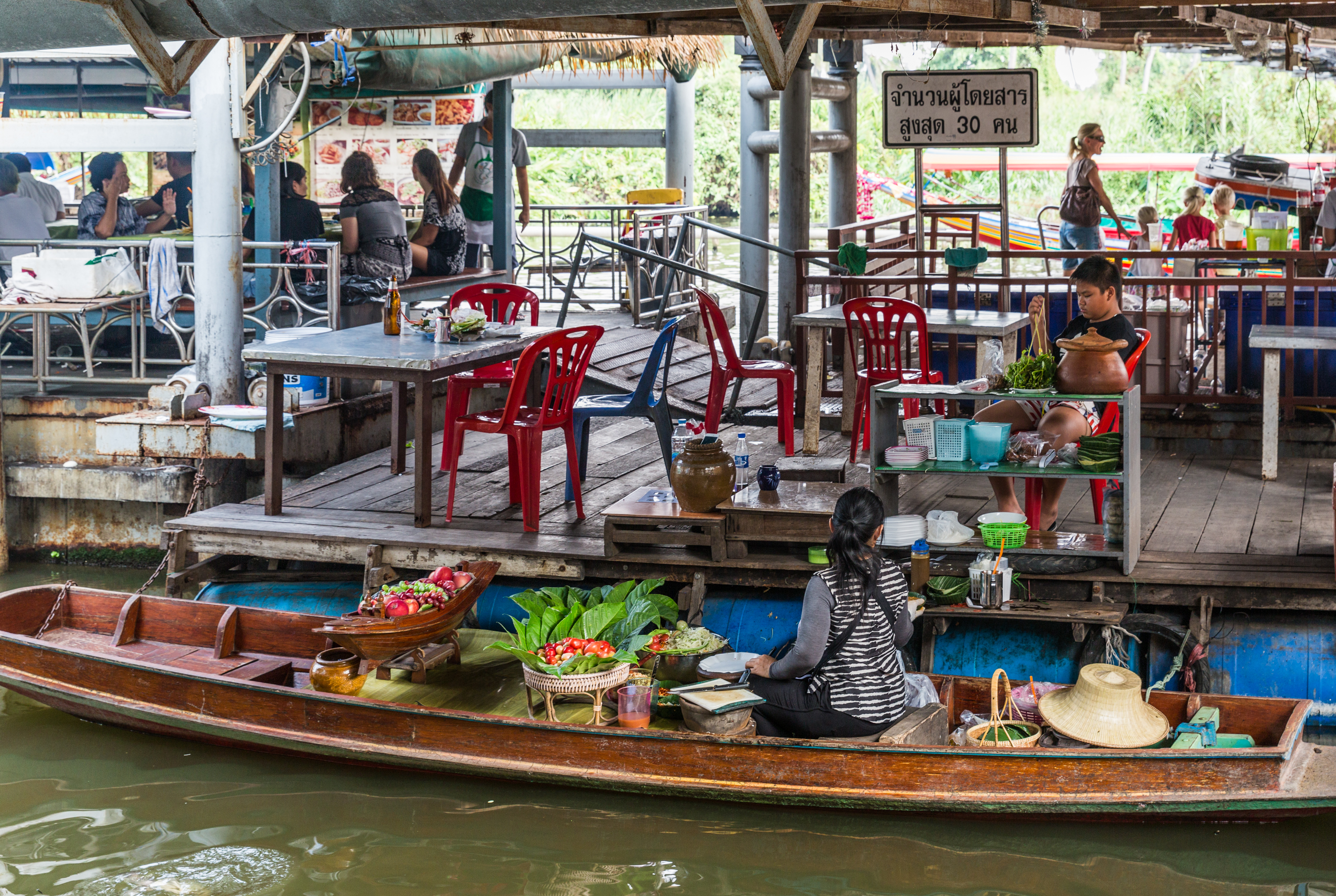 Bangkok, Thailand Canal tour, Floating market Taling Chan